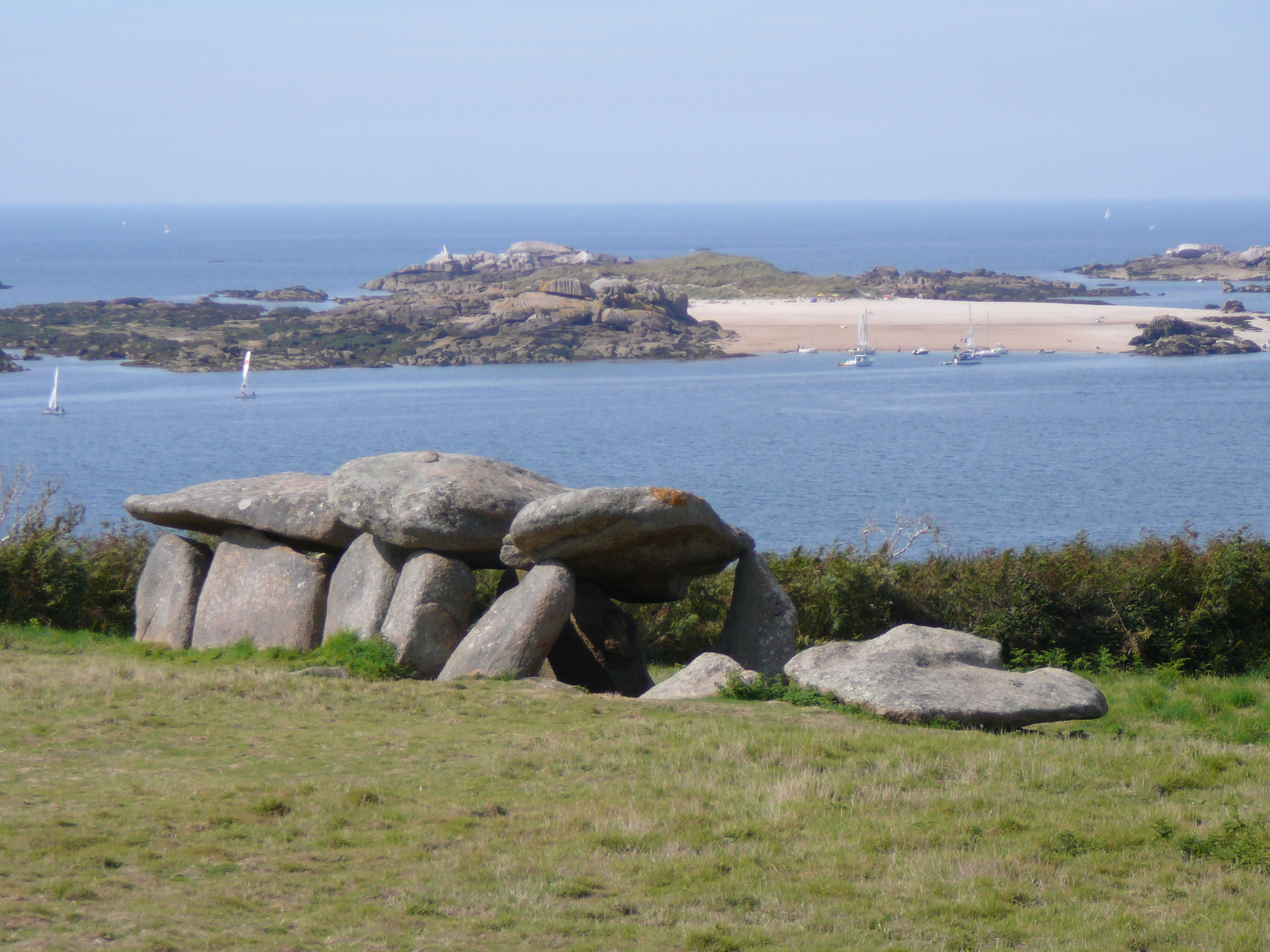 Allée couverte Ile Milliau vue sud (Trebeurden) .